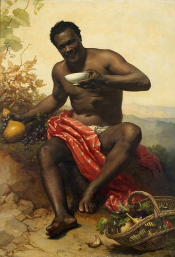 Joseph, le nègre, par Adolphe Brune (seconde moitié du XIXe siècle)